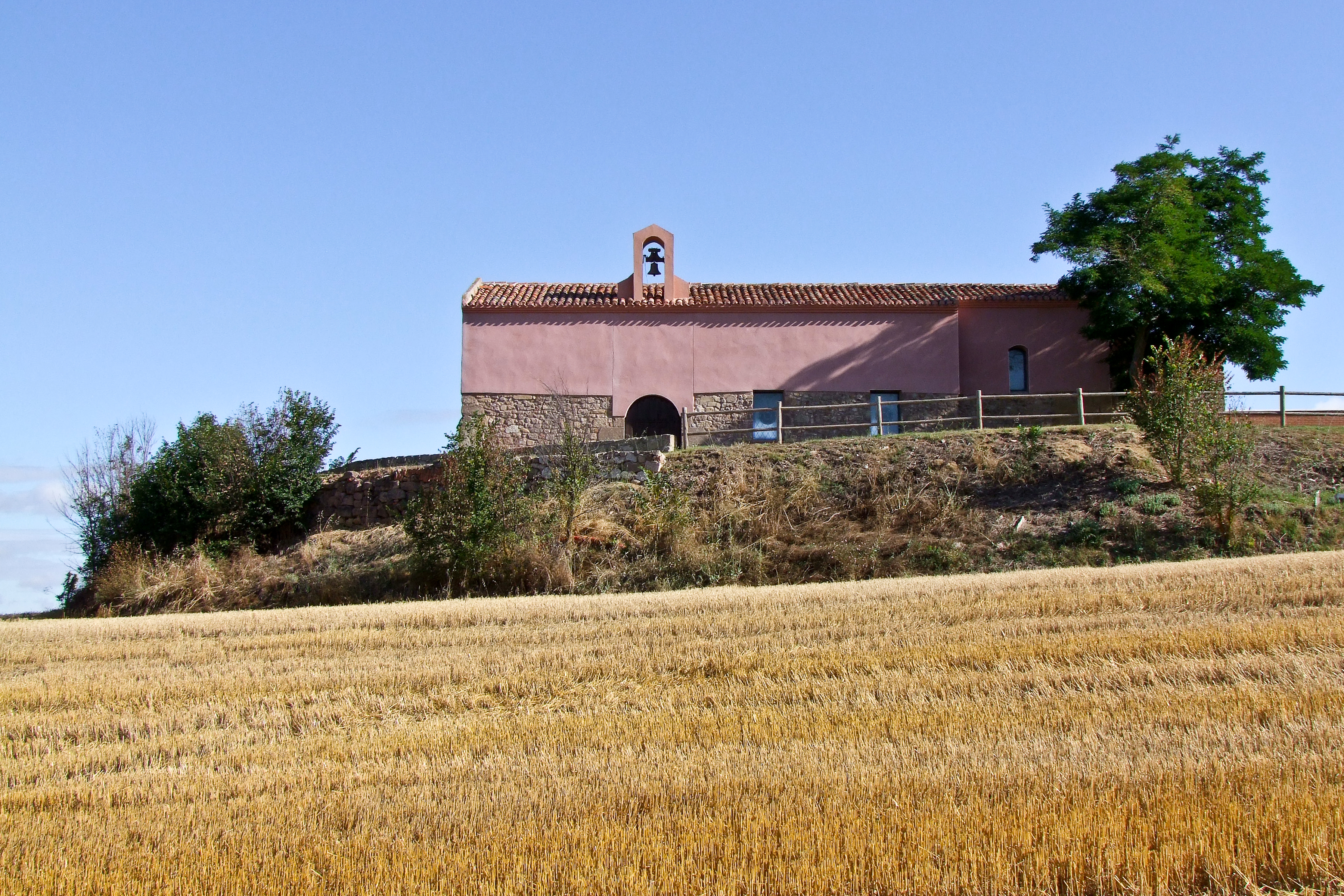 Ermita de la Virgen de los Remedios en la localidad de Cirueña, La Rioja - España